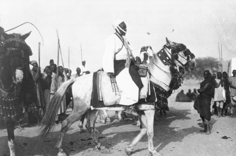 Afrika. Kamerun. Mora. Tukbene Kafim (Araber-Chef aus Warba).